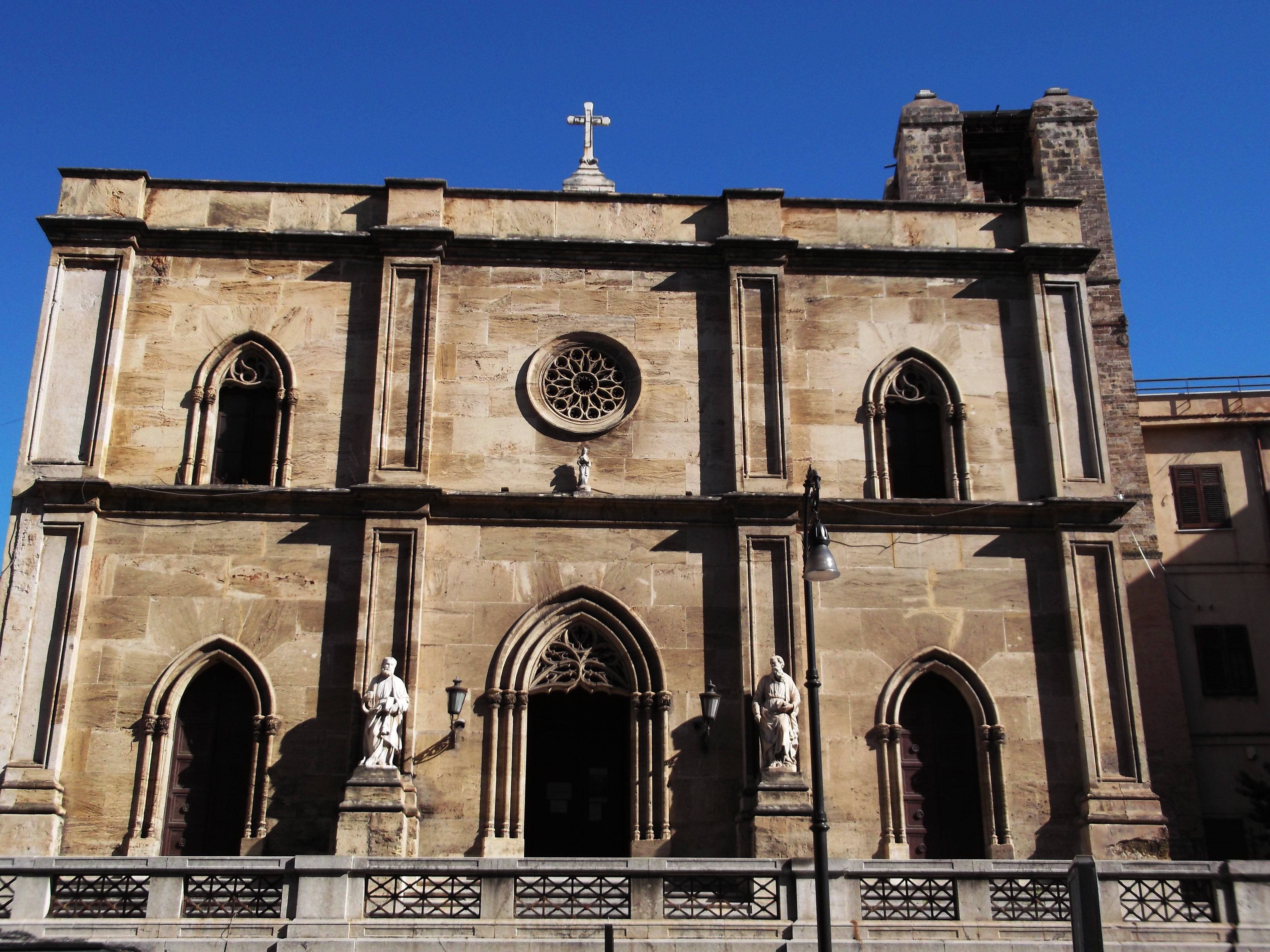 Facciata